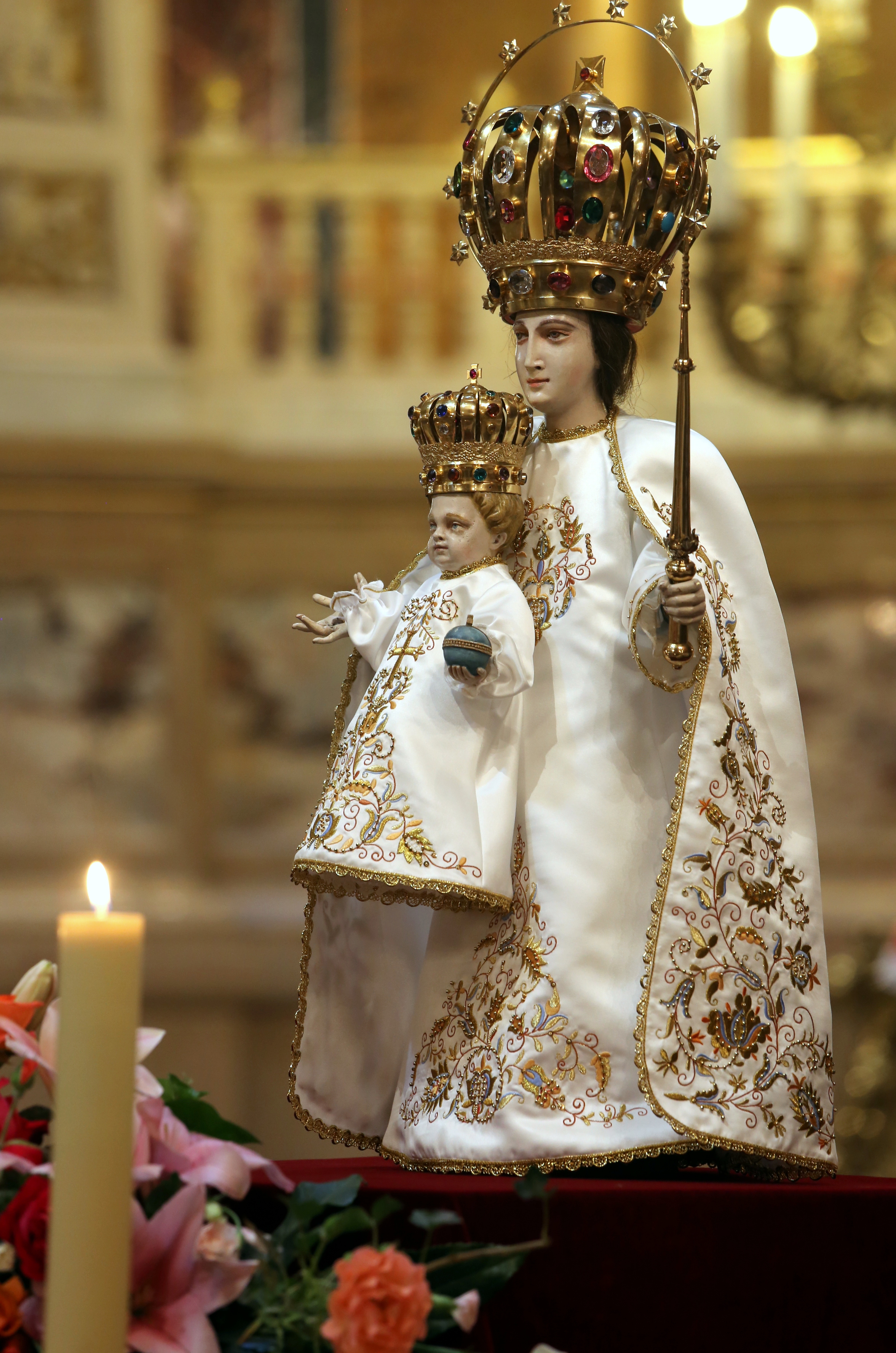 Mátraverebély-Szentkúti kegyszobor a budapesti Szent István bazilikában